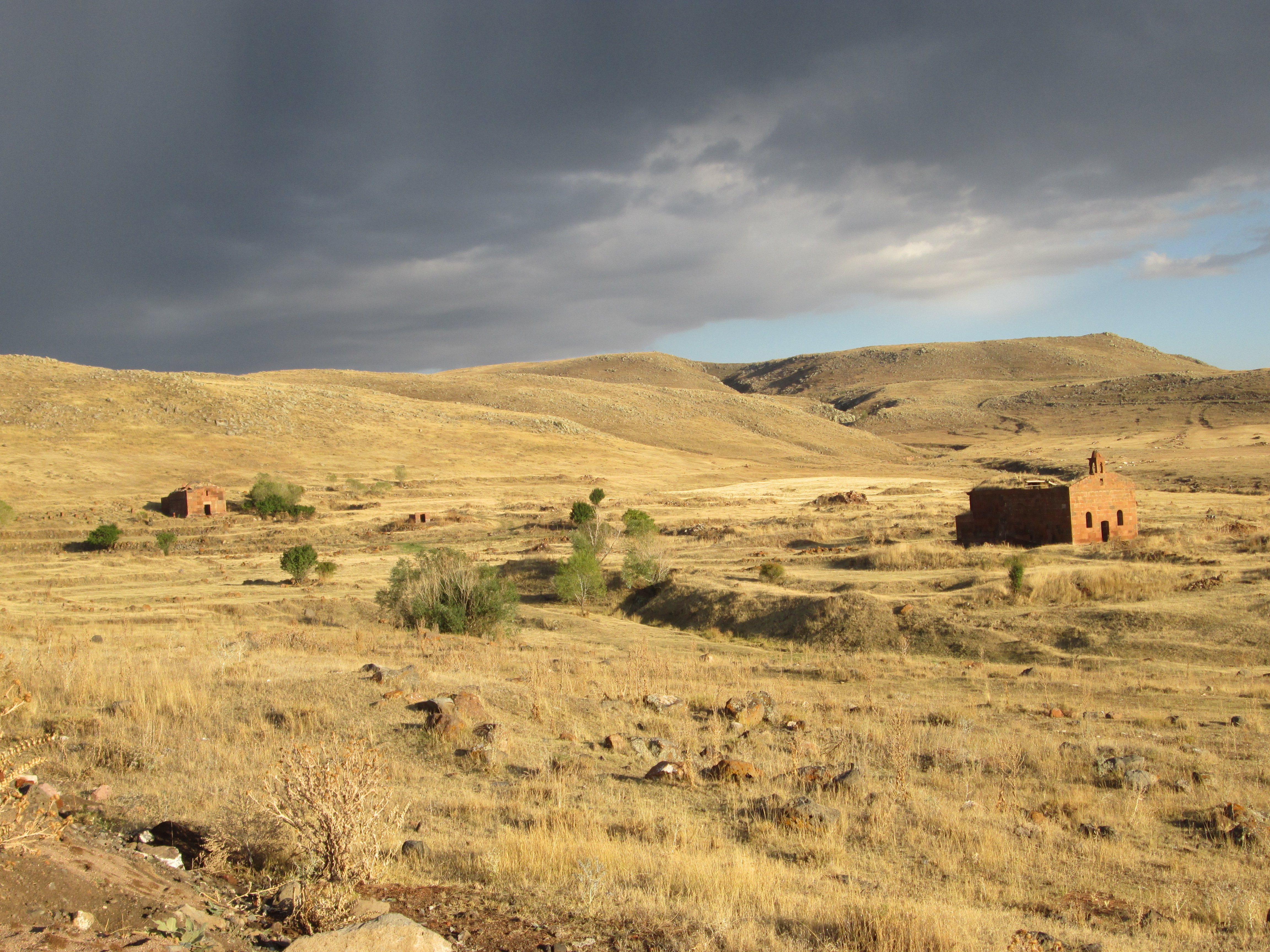 Եկեղեցի Ս. Ամենափրկիչ, Գյուղատեղի Շենիկ, Մաստարա գյուղից 6 կմ հյուսիս 69/6